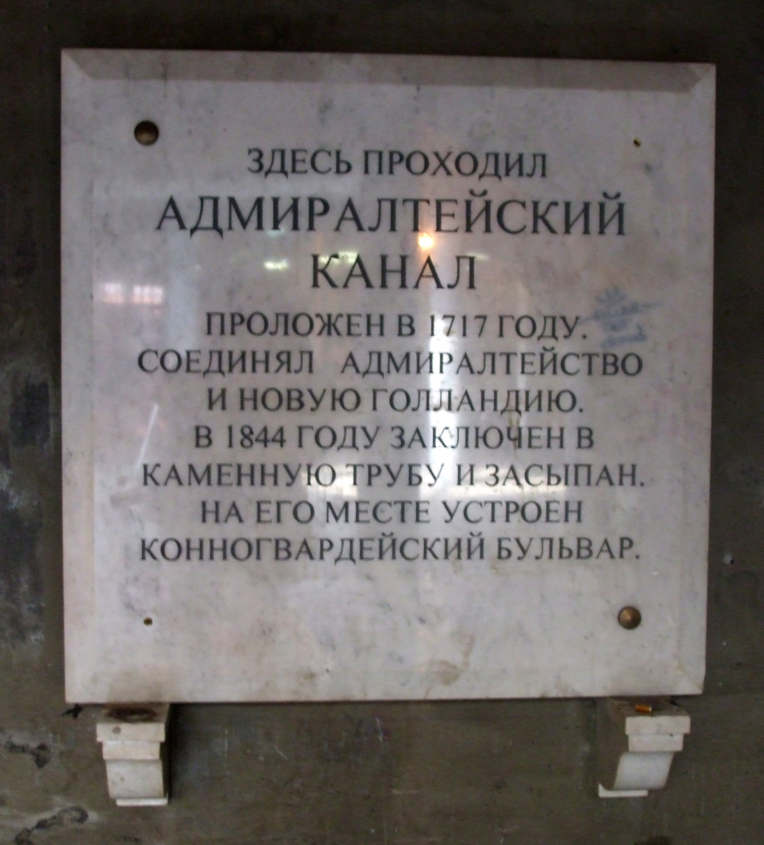 Площадь Труда, Санкт-Петербург